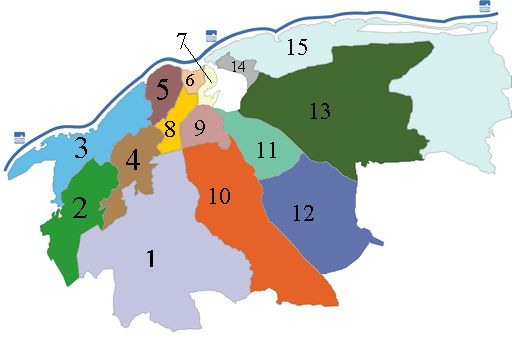 Karta hawana